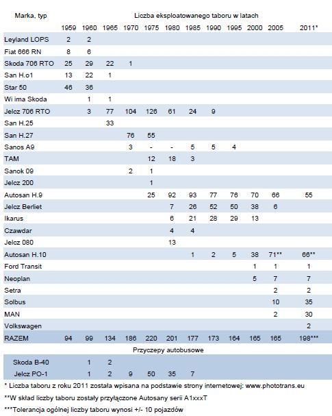 Tabor eksploatowany przez PKS w Rzeszowie w latach 1959-2011